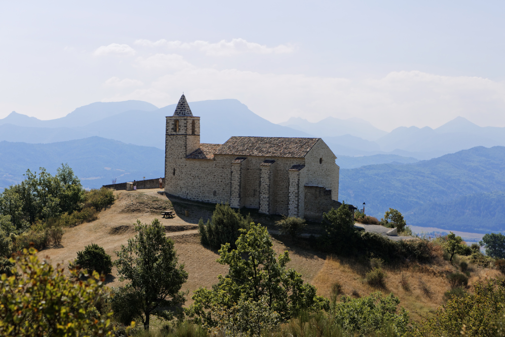 Église Sainte-Marie-Madeleine à Aiglun